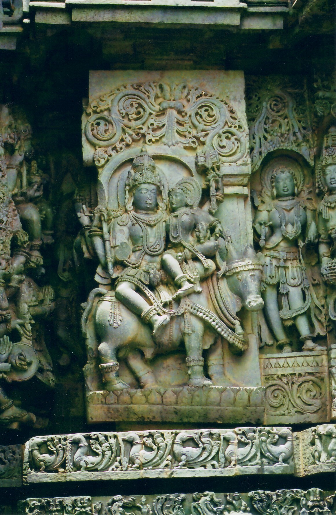 Shiva, Parvati and Nandi sculpture et Hoysaleshwara Temple, Halebidu, Karnataka, India.